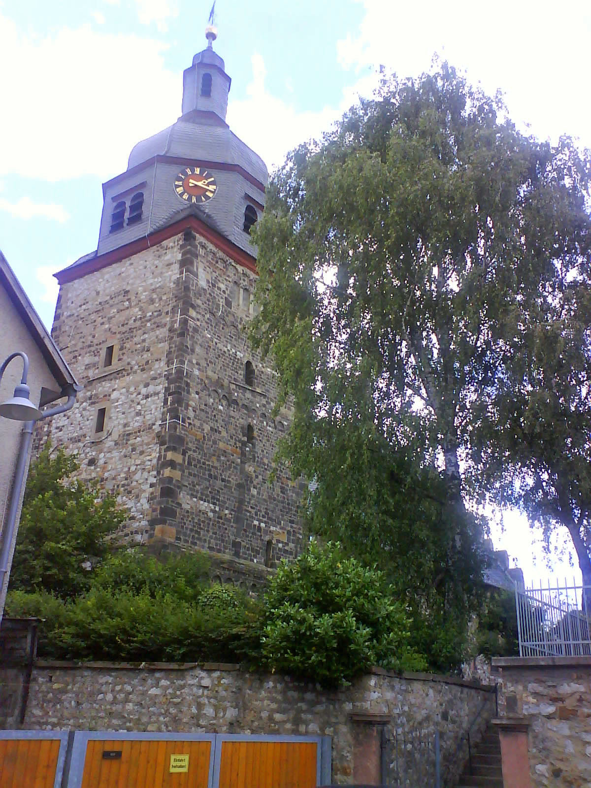 Turm der evangelischen Pfarrkirche in Butzbach-Nieder-Weisel